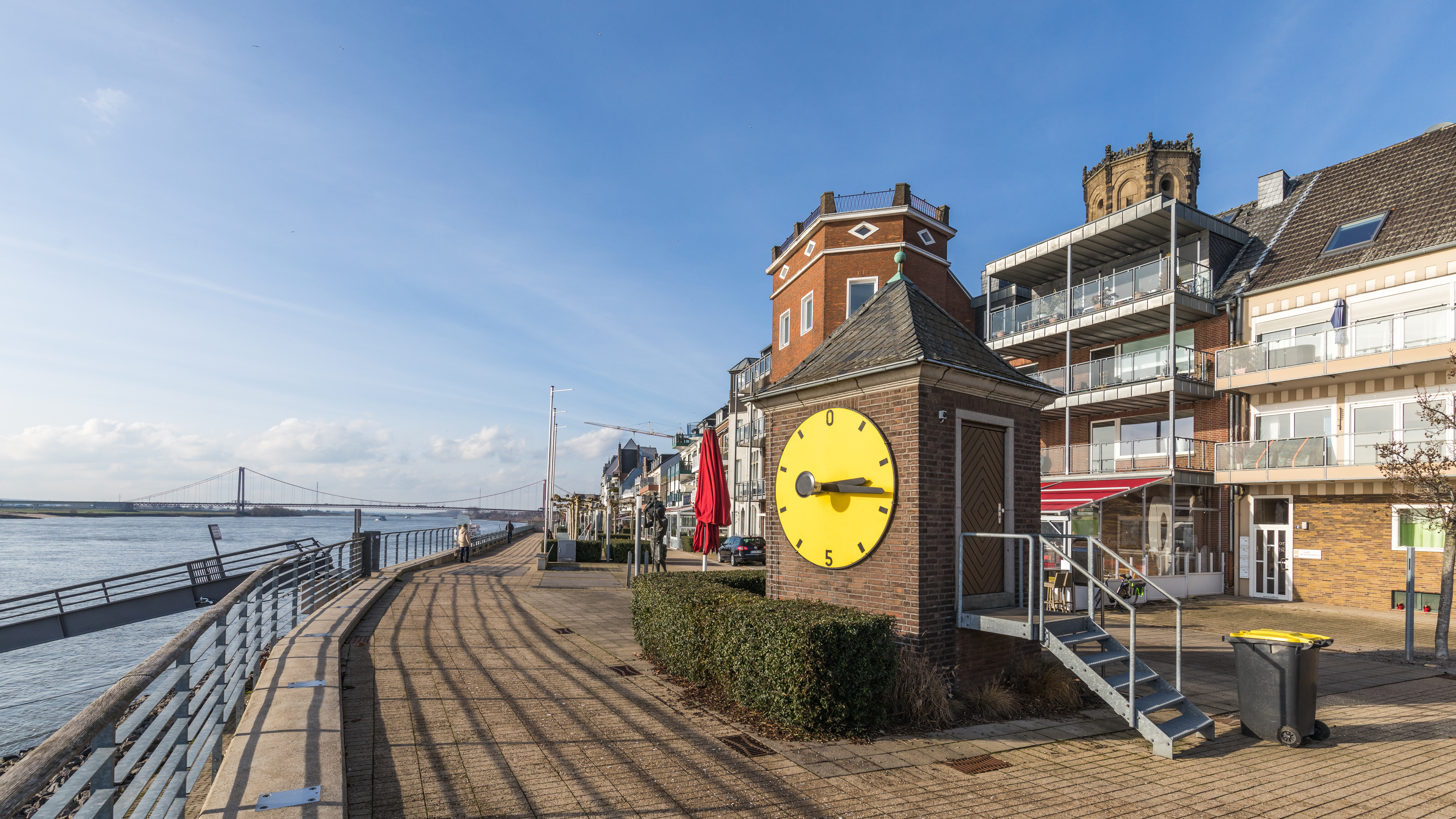 Rheinpromenade mit Pegelhaus, Emmerich am Rhein